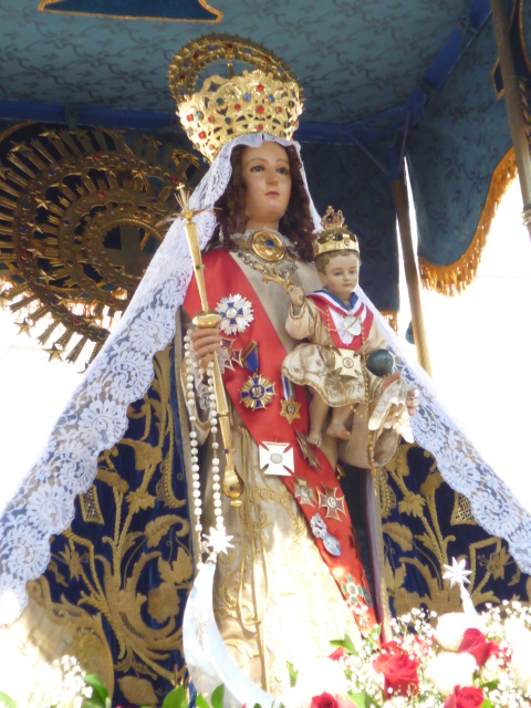 Fiestas patronales 2012